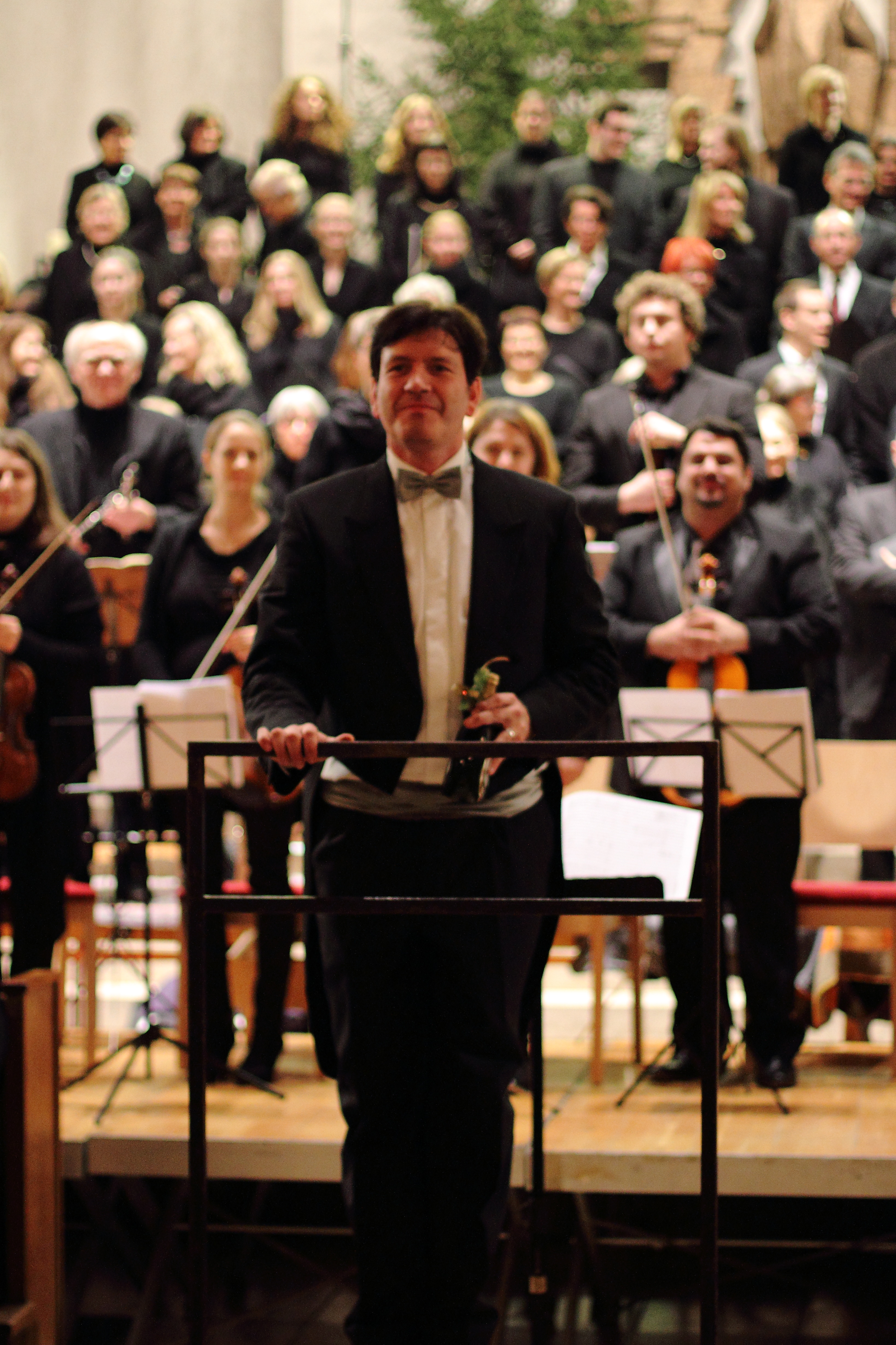 Dirigent Matthias Göttemann mit dem Oratorienchor Würzburg im Dezember 2015 in der Heiligkreuzkirche Würzburg.